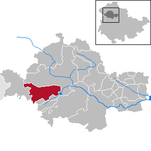 Vogtei in Thuringia - Unstrut-Hainich-Kreis